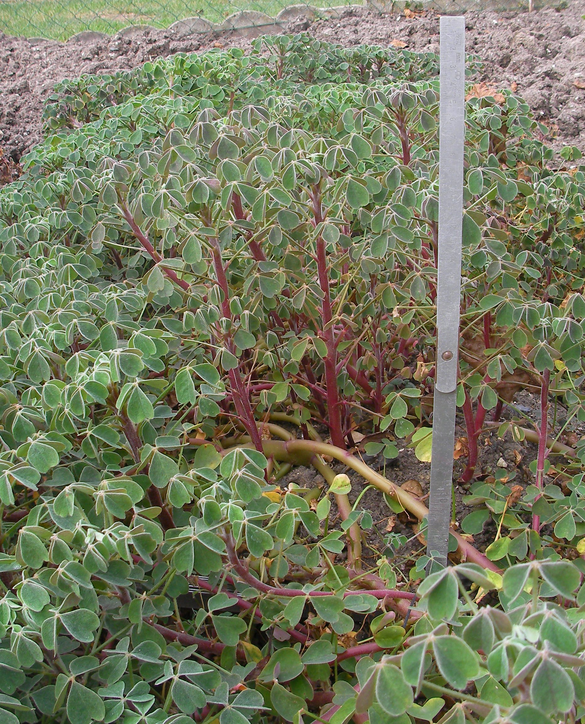 photo de plants d'ocas du pérou